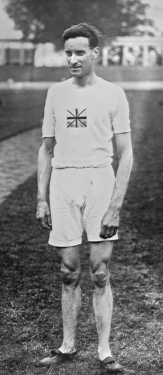 James Wilson, gagnant [d'une] série [du] 10000 m [Jeux olympiques d'Anvers